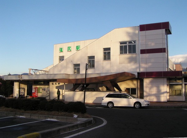 塩尻駅